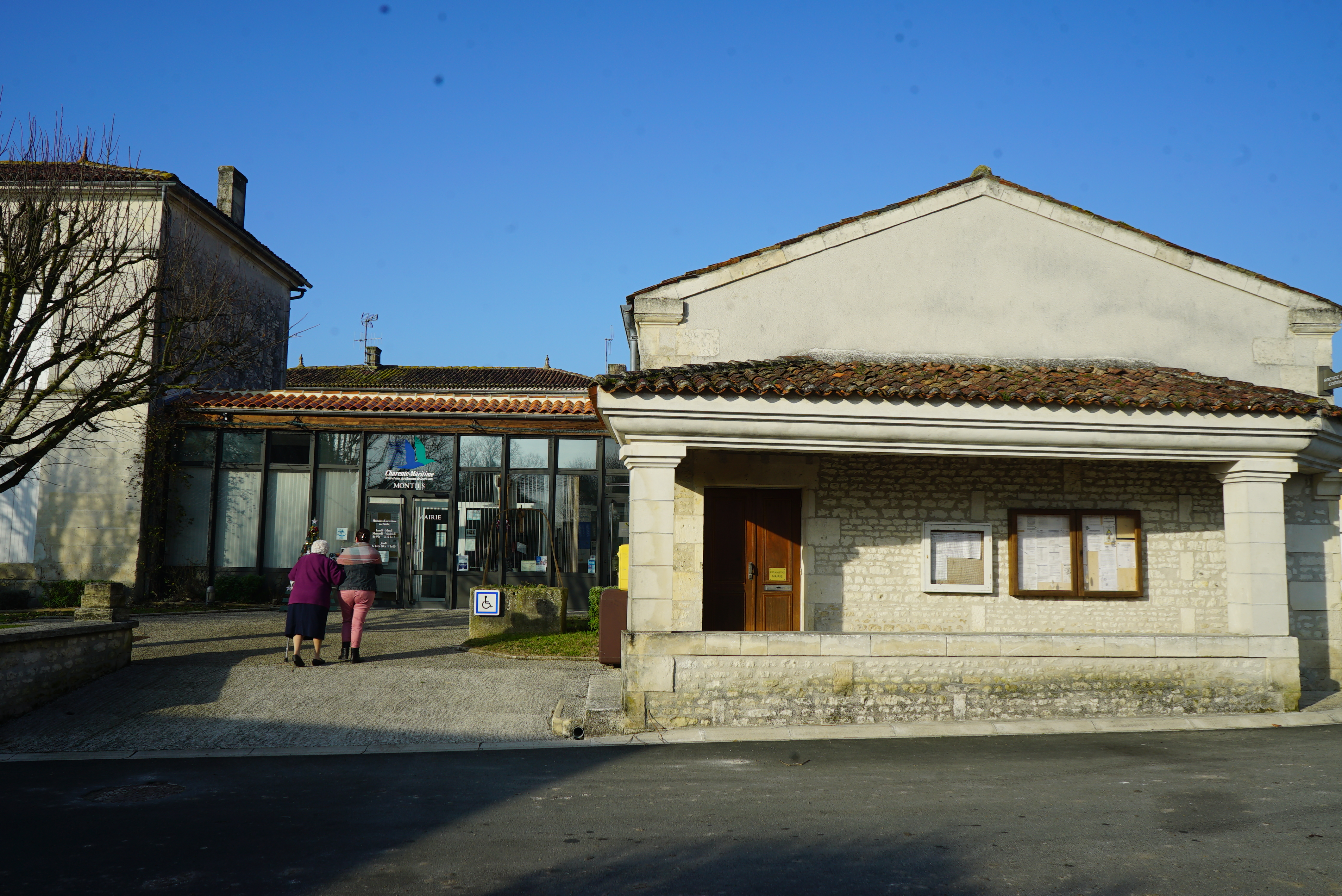 du village de montils.